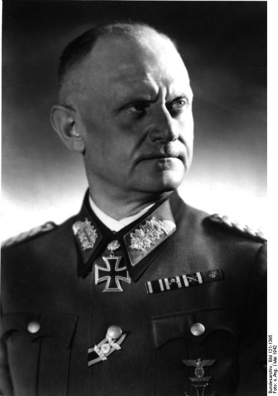 Eichenlaubträger Generalmajor Wünnenberg Berlin, 15.5.42